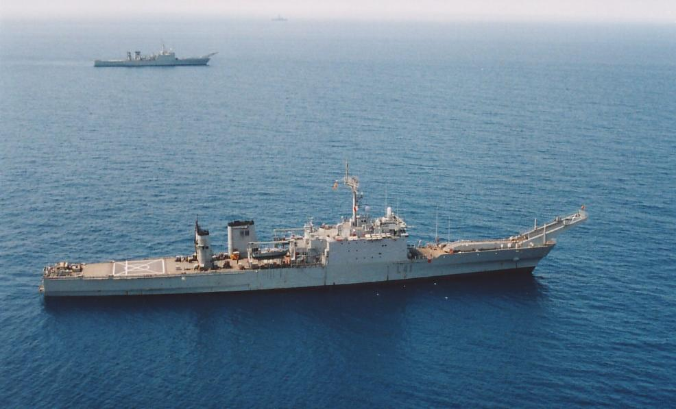 LST Hernán Cortés (L-41), ex. USS-Barnstable County (L-1197). Clase Newport. Dado de alta en la Armada Española en agosto de 1994; Al fondo su gemelo Pizarro (L-42)